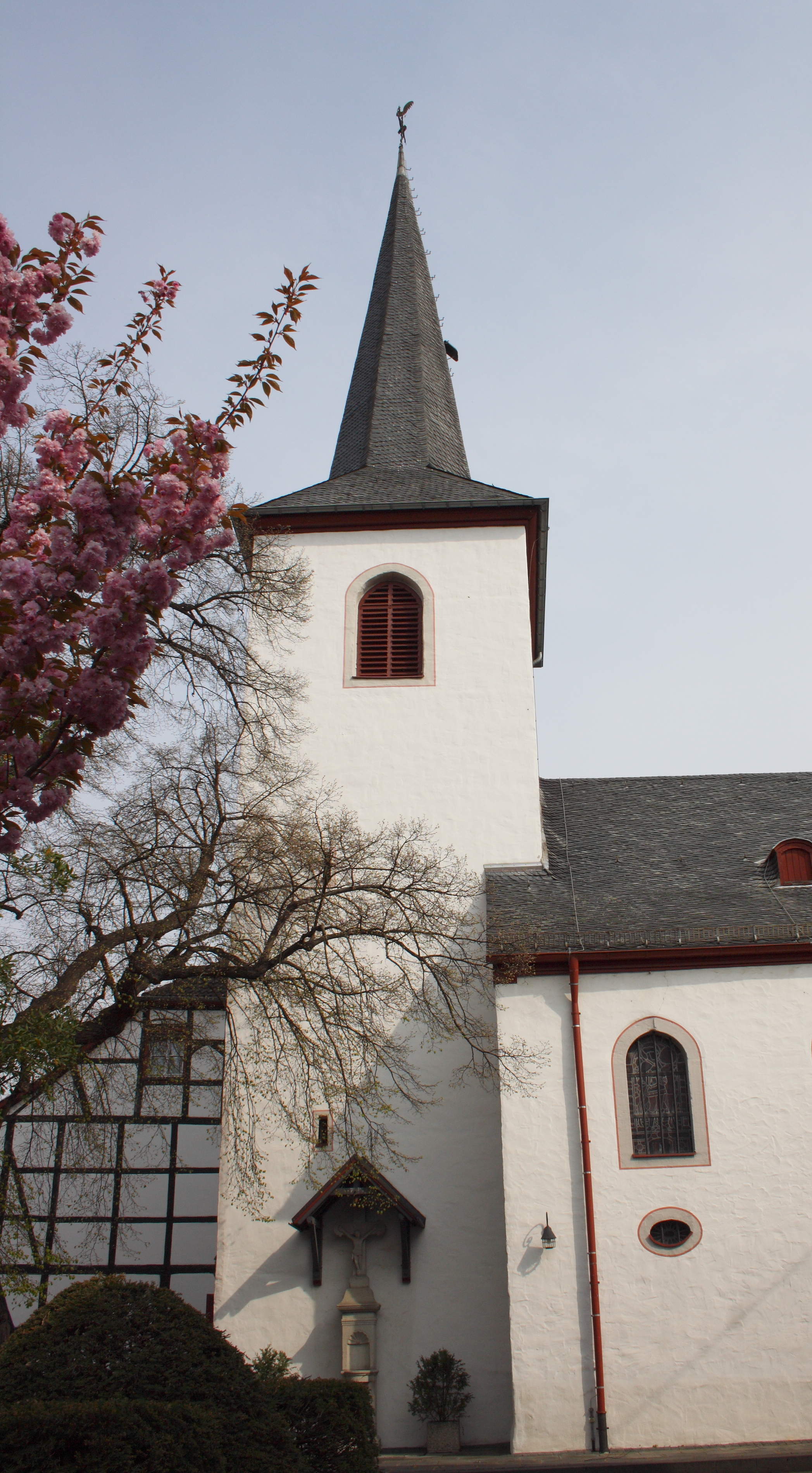 katholische Pfarrkirche St. Ägidius in Oberdrees, einem Stadtteil von Rheinbach